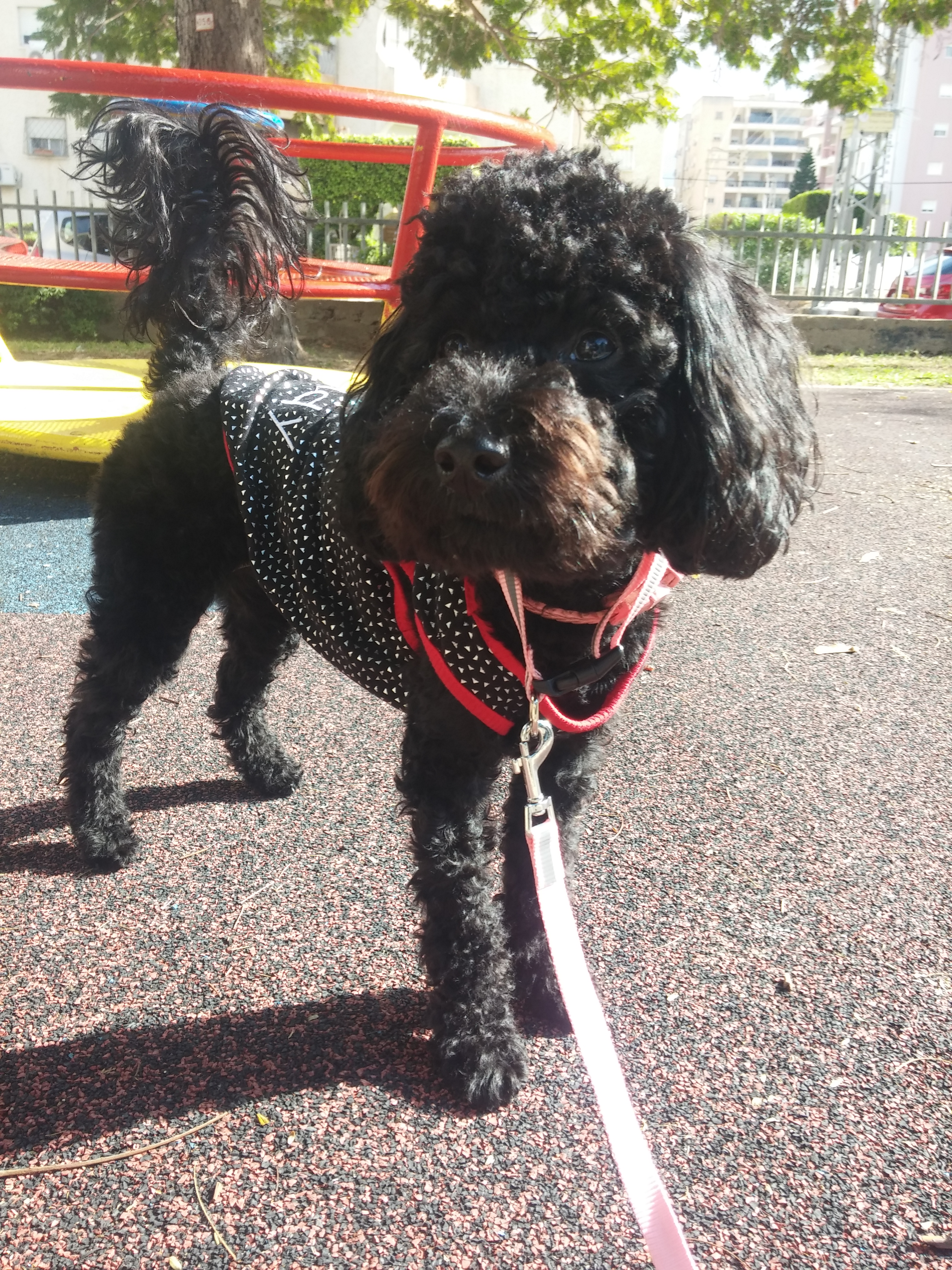 'זואי', פודל ננסי ממין נקבה.